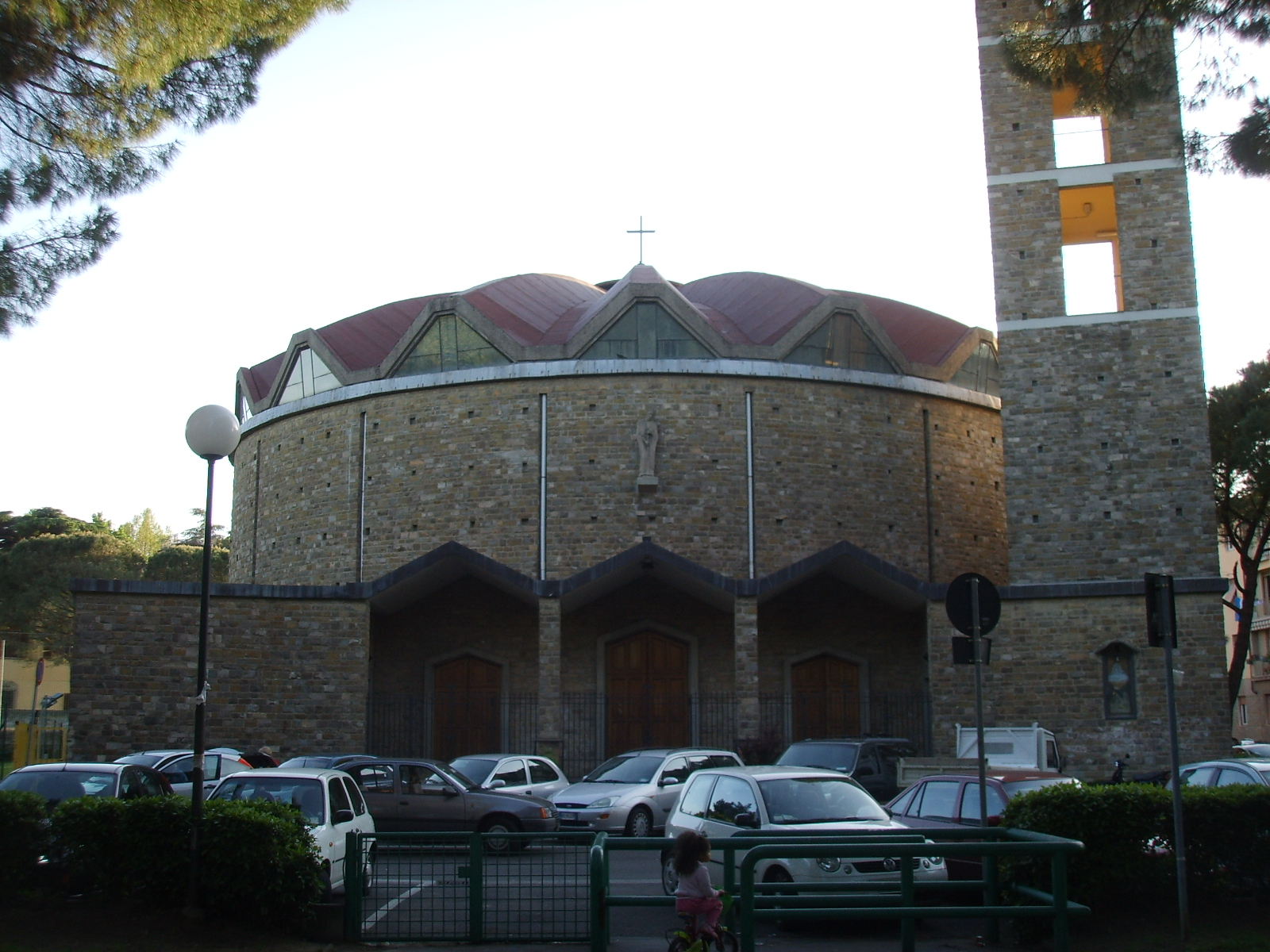 Chiesa di san pietro in palco